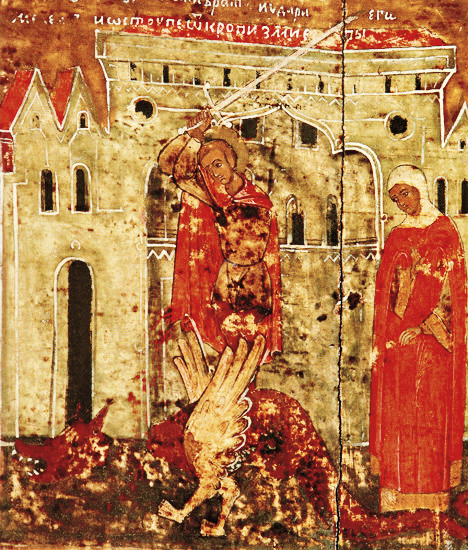 Петр убивает змея. Фрагмент иконы "Петр и Феврония Муромские с житием". Русь. 1618 г. (Ретушь: В. Лобачев; оригинал: File:Петр убивает змея.jpg)